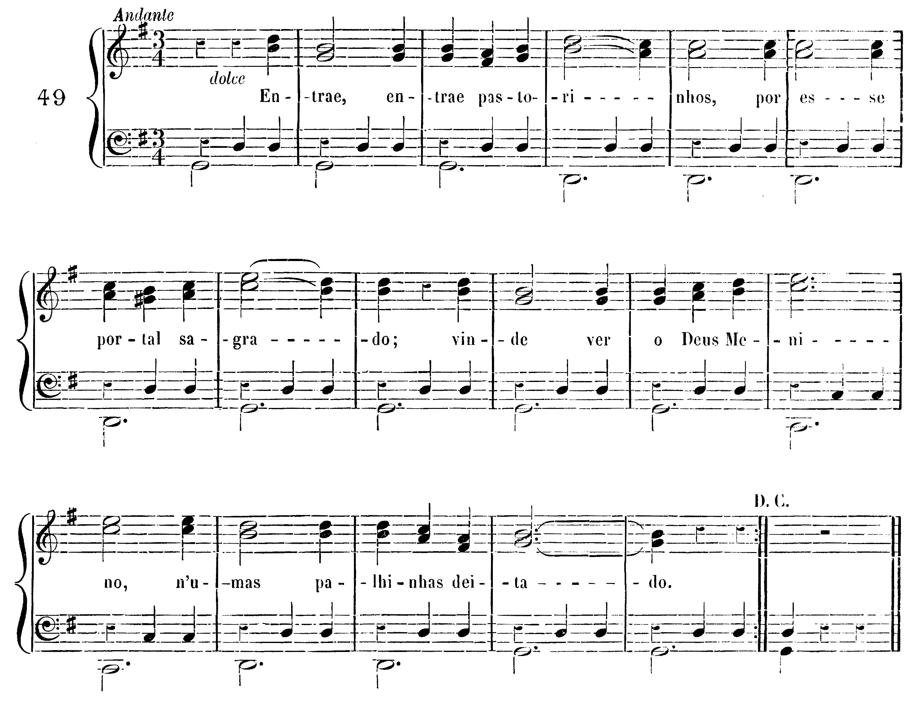 "Entrai, entrai, pastorinhos" é uma canção de Natal tradicional portuguesa conhecida também no Brasil.